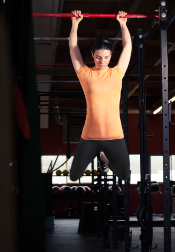 Tractions